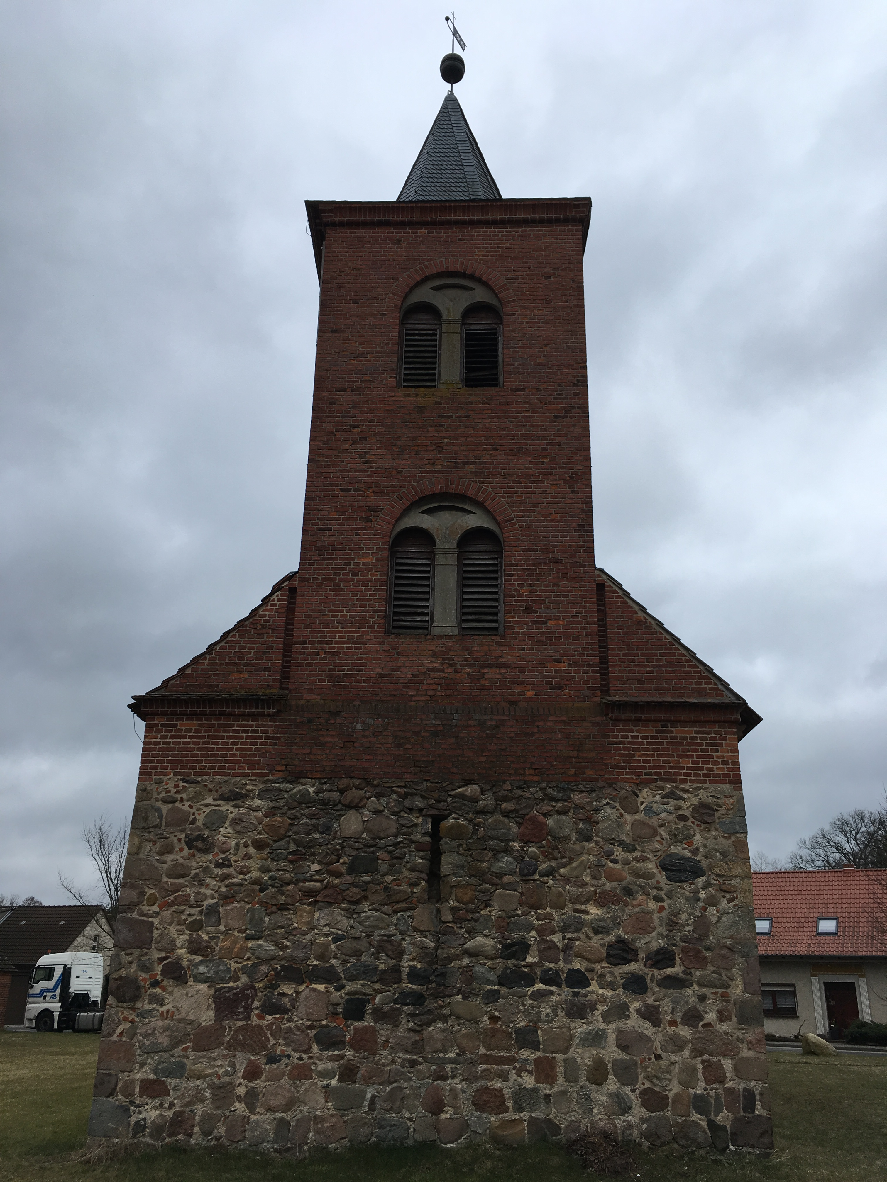 Die Dorfkirche in Gräben ist eine Feldsteinkirche, die vermutlich im 14. Jahrhundert entstand.